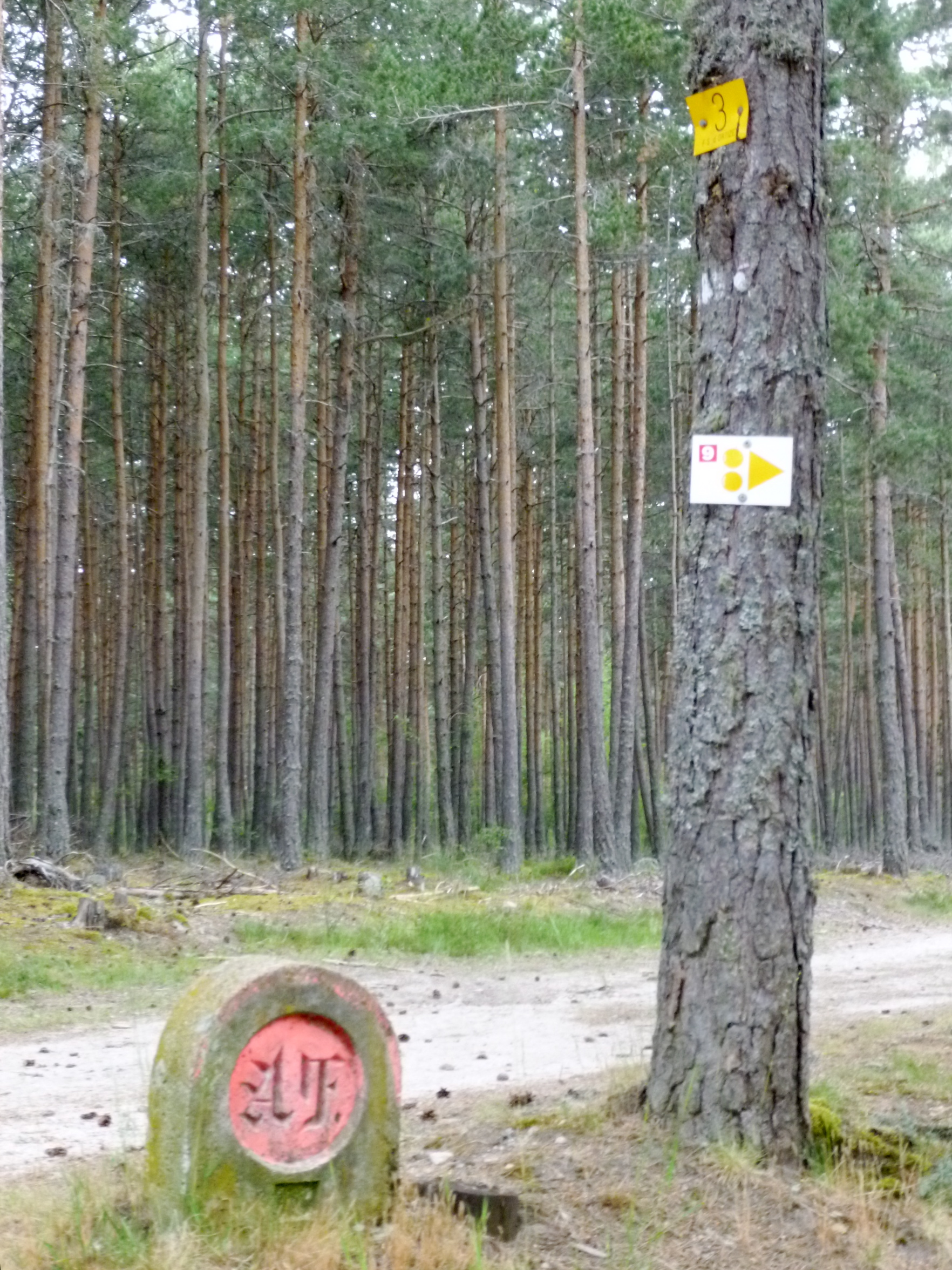 forêt de Ganigal Lozère